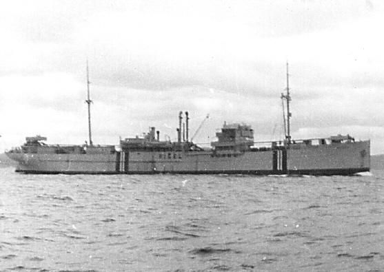 Das norwegische Motorschiff Rigel